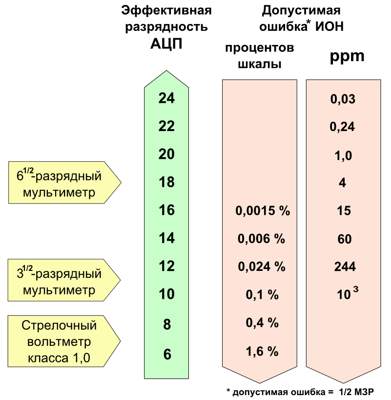 Связь эффективной (не номинальной!) разрядности измерительного АЦП и допустимой ошибки в %% и ppm. Исходные данные - Mitchell Lee, Understanding and Applying Voltage References, Linear Technology Application Note 82, November 1999, page 1